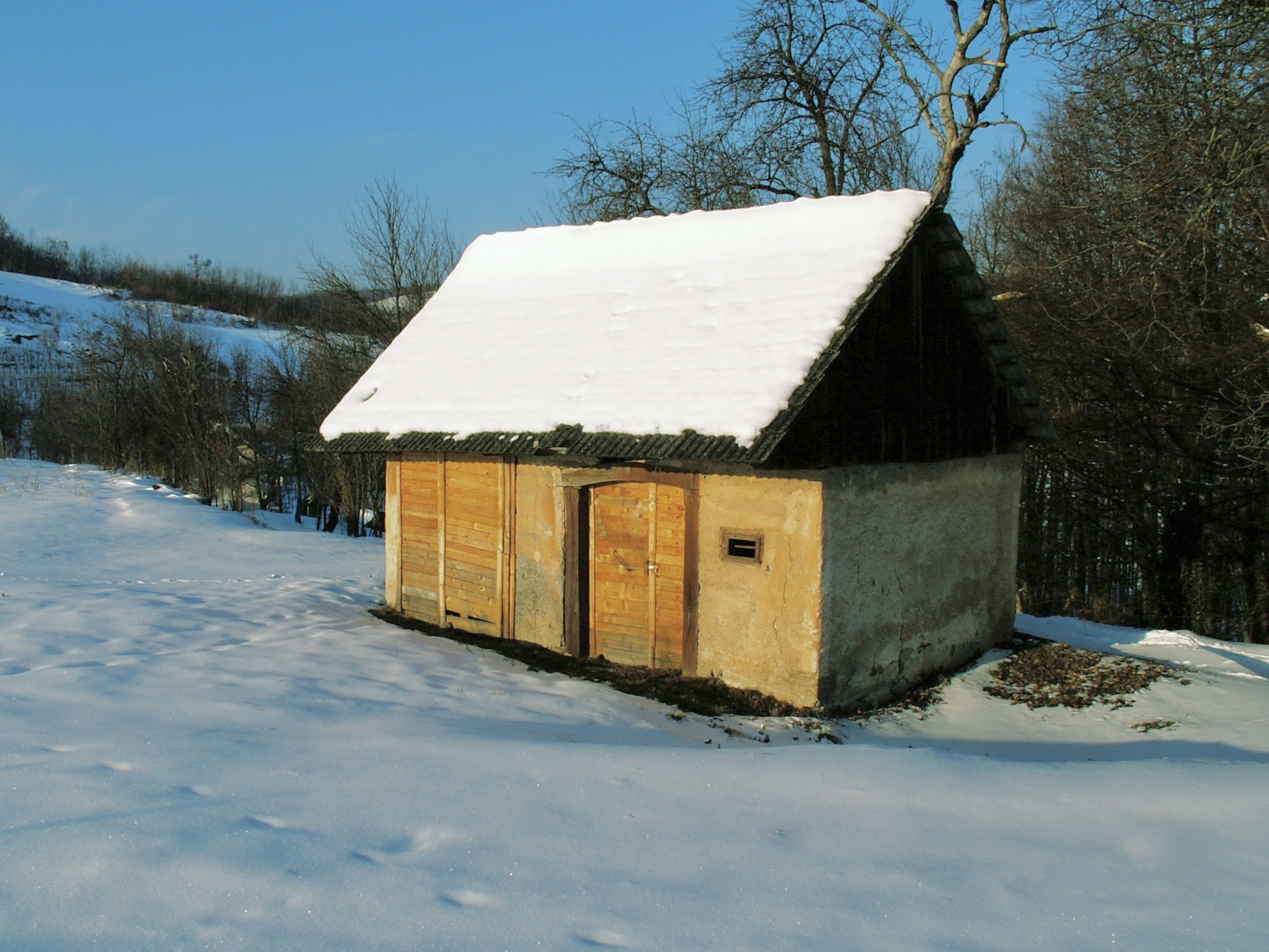 Tipična dolenjska enoprostorna zidanica na Trški gori